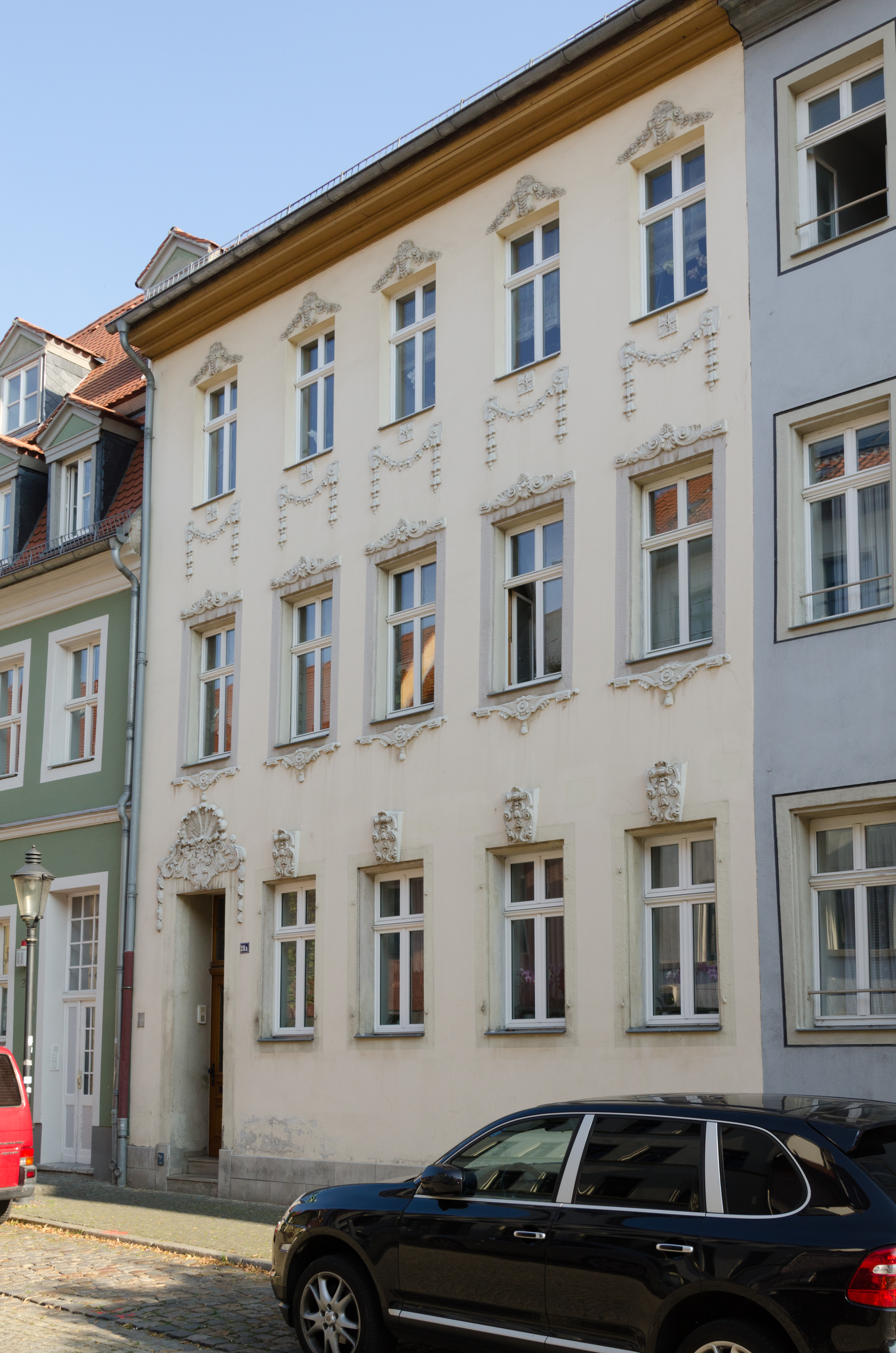 Naumburg, Fischstraße 28a